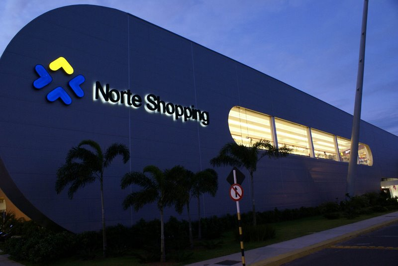 Foto do Norte Shopping em Natal/RN